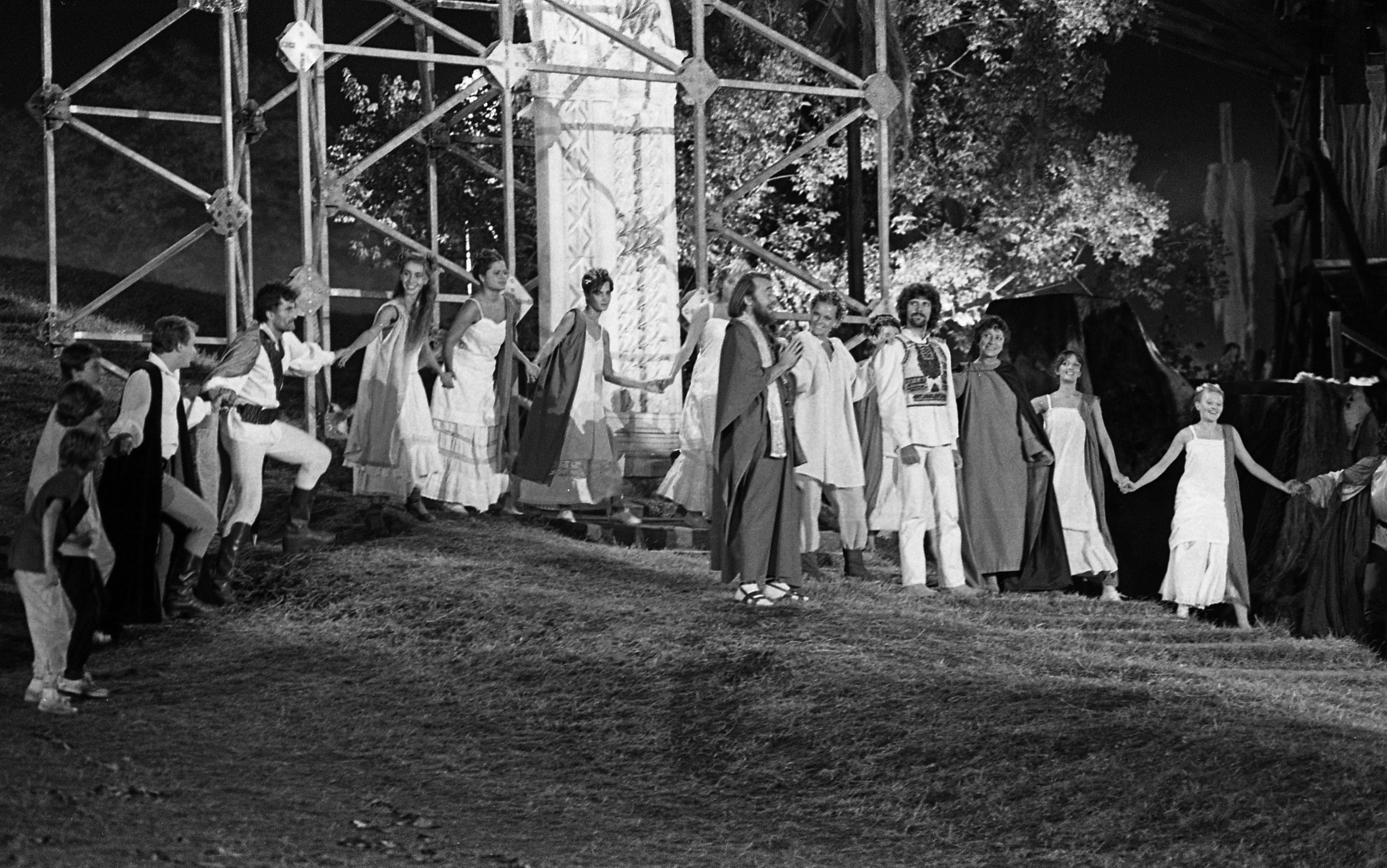 Szörényi Levente - Bródy János: István, a király című rockopera bemutatója és filmfelvétele 1983. augusztus 18-án a városligeti Királydombon. Rendező Koltay Gábor. Középen Asztrik szerepében Victor Máté, István szerepében Pelsőczy László, Sarolt szerepében Berek Kati.